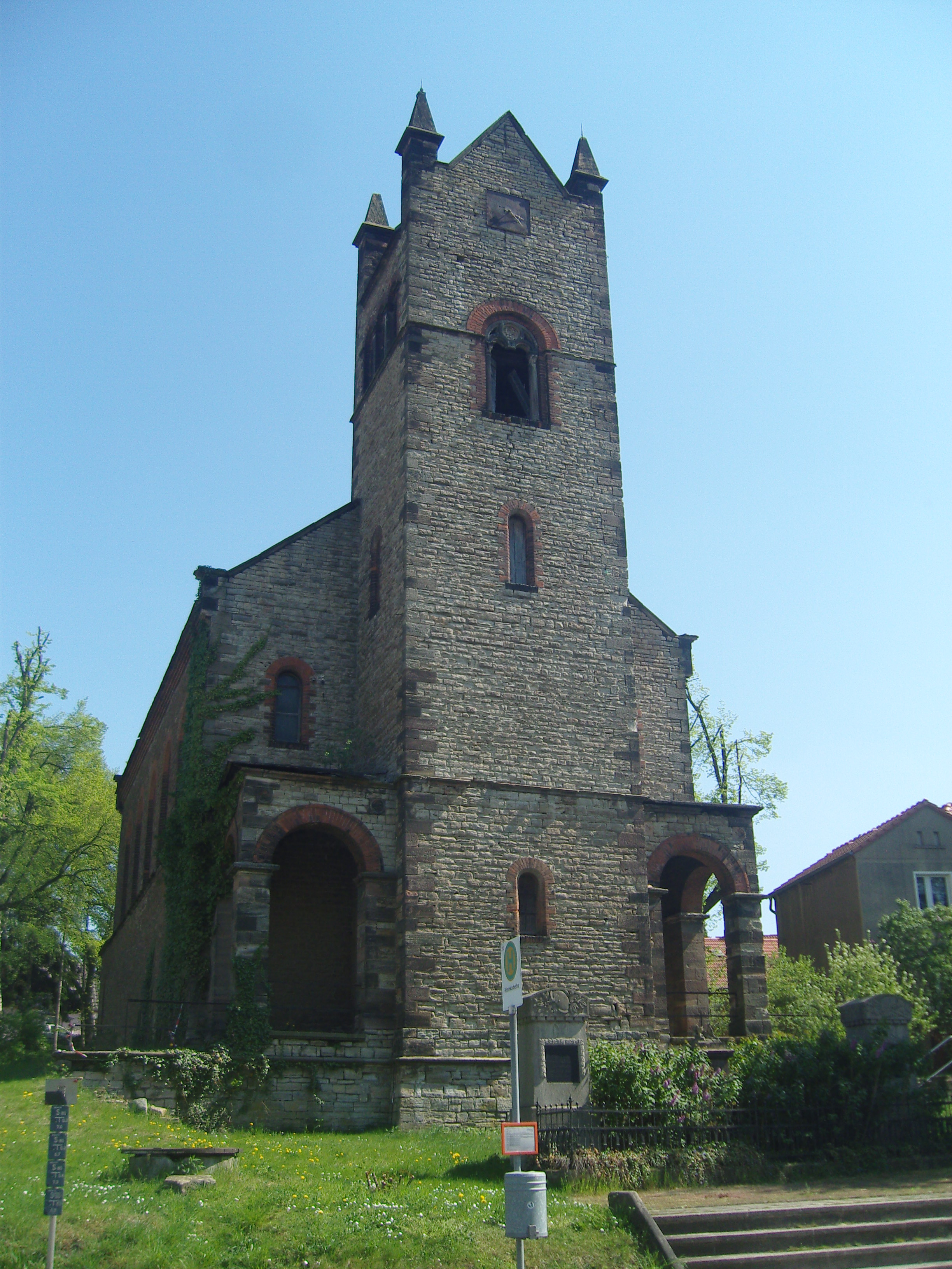 Kirche in Kleinkorbetha